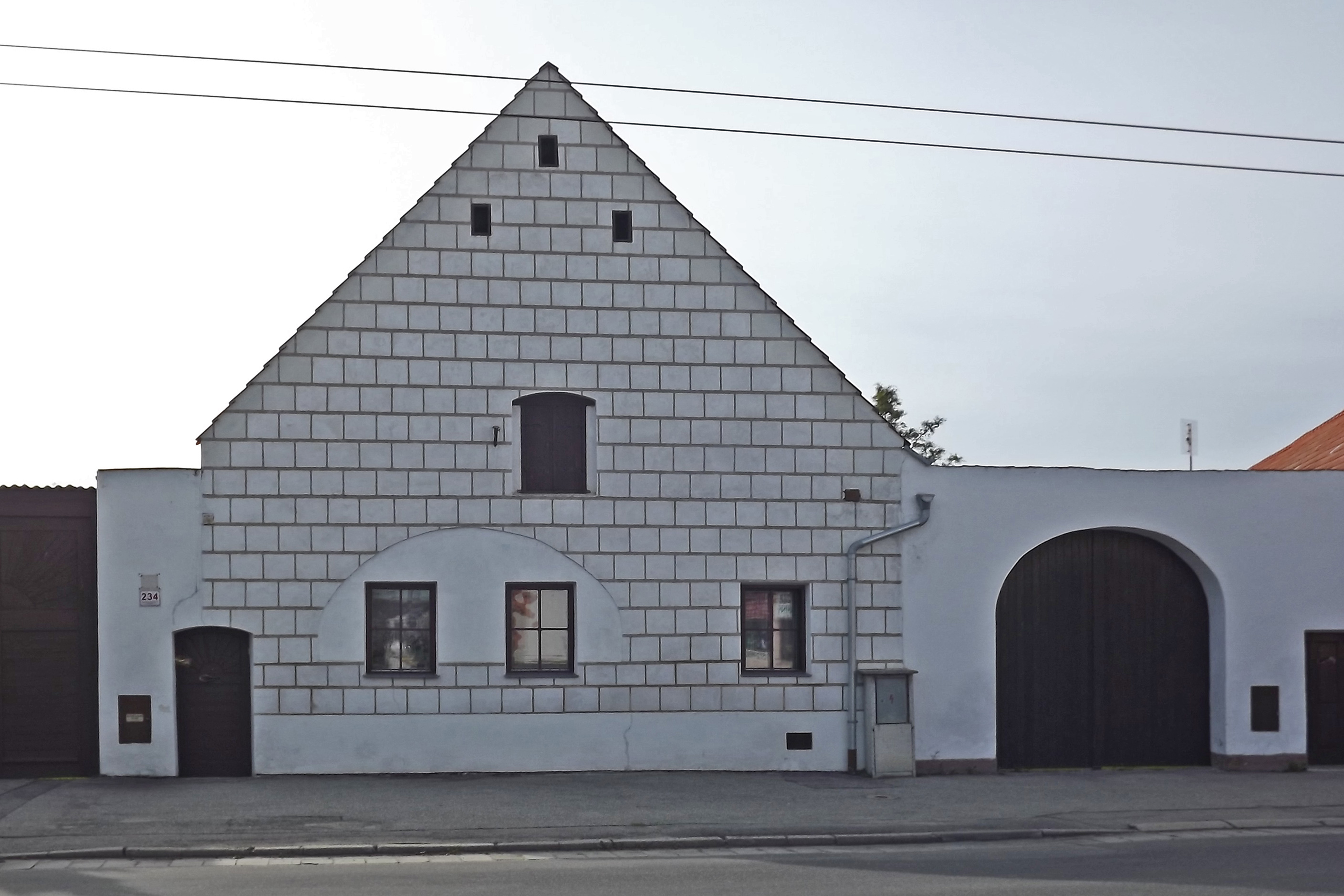 venkovská usedlost, Lidická 1269/234, České Budějovice